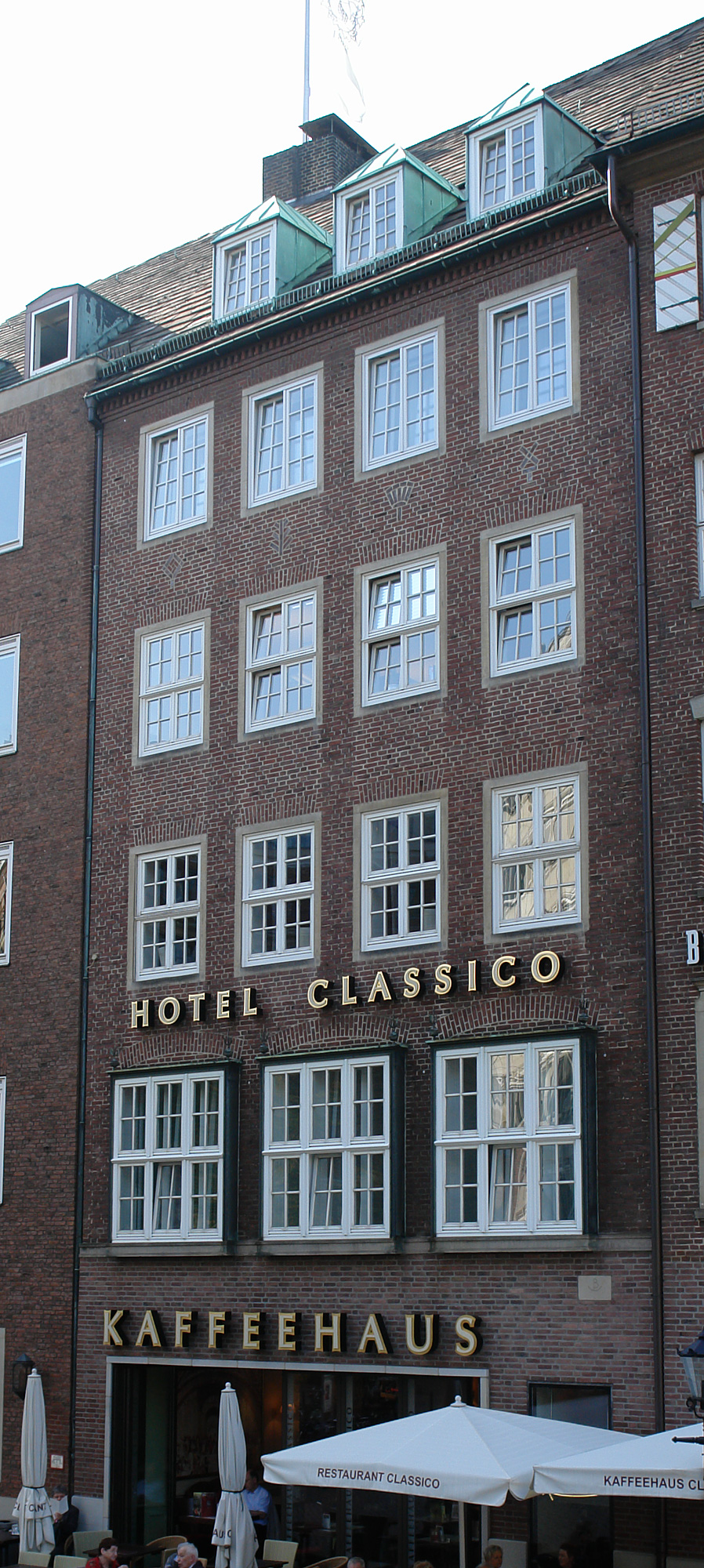 Eduscho-Haus, Bankhaus Carl F. Plump und Co. in Bremen, Am Markt 18.Das abgebildete Objekt ist ein geschütztes Kulturdenkmal in der Freien Hansestadt Bremen, mit der Nr. 0175 beim Landesamt für Denkmalpflege registriert.